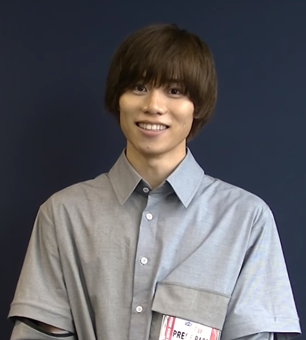 太田将熙（俳優）